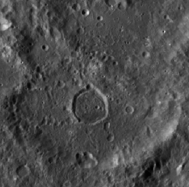 Cráter lunar Zwicky. (Imagen LRO)